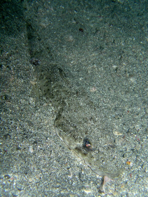 イネゴチ Cociella crocodila